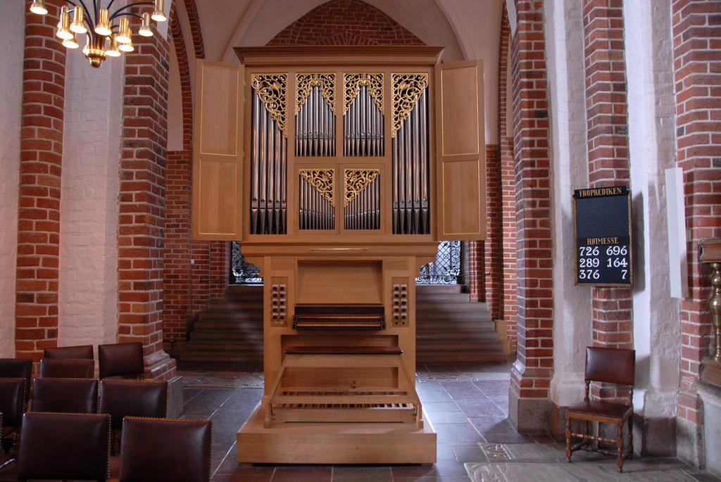 Orgel anno 2007:)